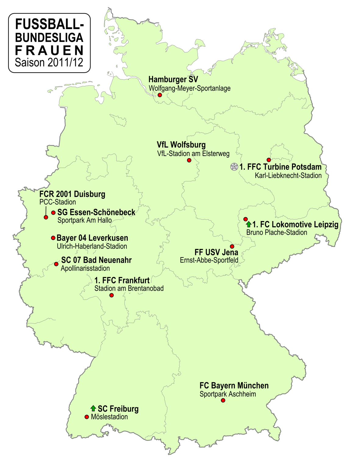 Karte der Vereine der Frauen Fußball-Bundesliga-Saison 2011/2012